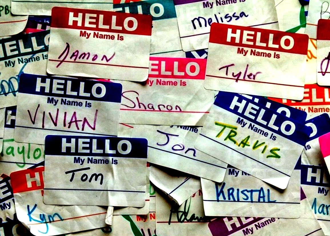 Chicago, Illinois